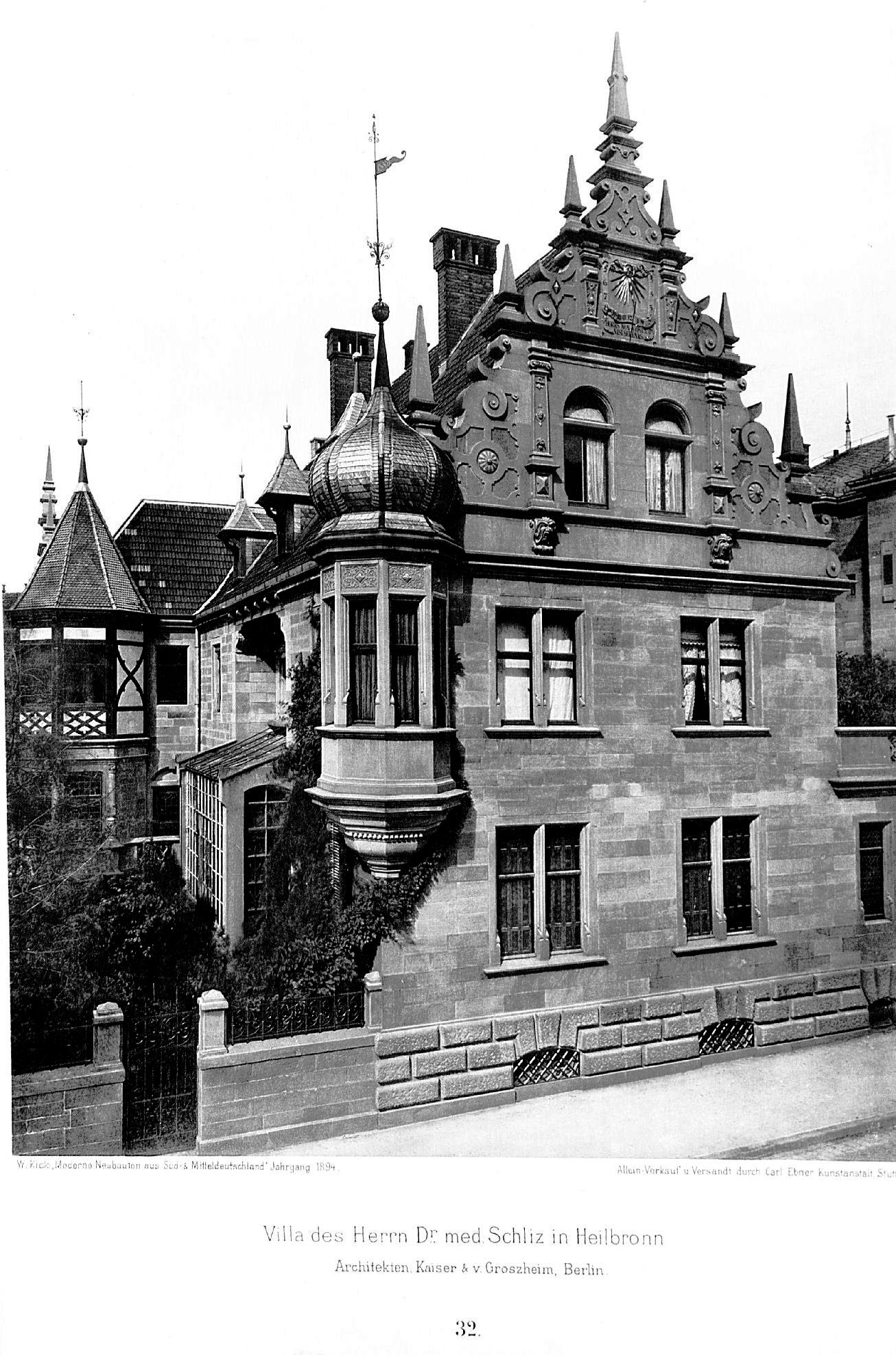 Wohnhaus für Alfred Schliz in Heilbronn, Hohe Straße; erbaut 1885 nach Entwurf der Berliner Architekten Kayser und von Großheim; bis auf geringe bauliche Reste (Siebeneichgasse 12) zerstört